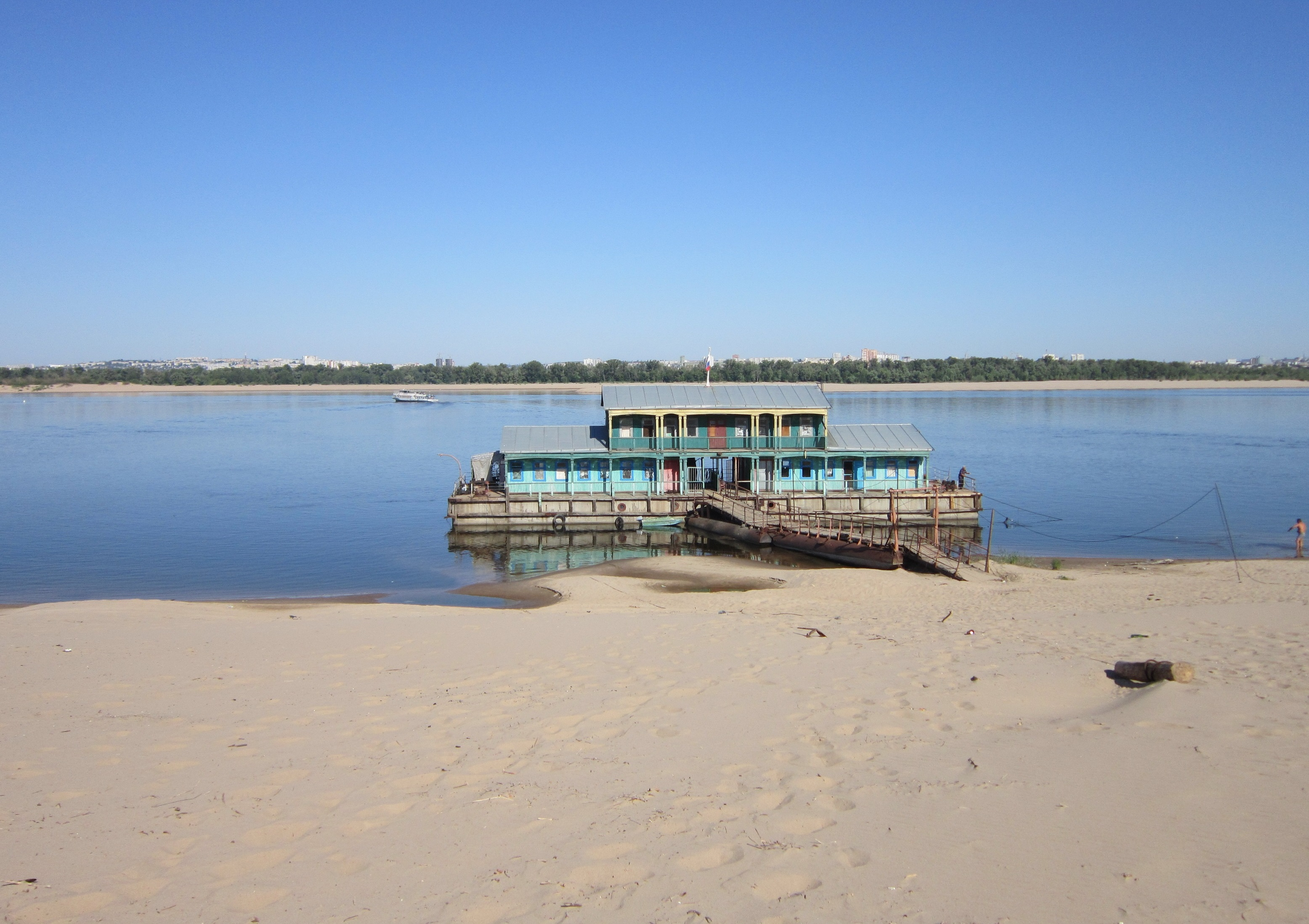 Дебаркадер в Краснослободске, Волгоградской области